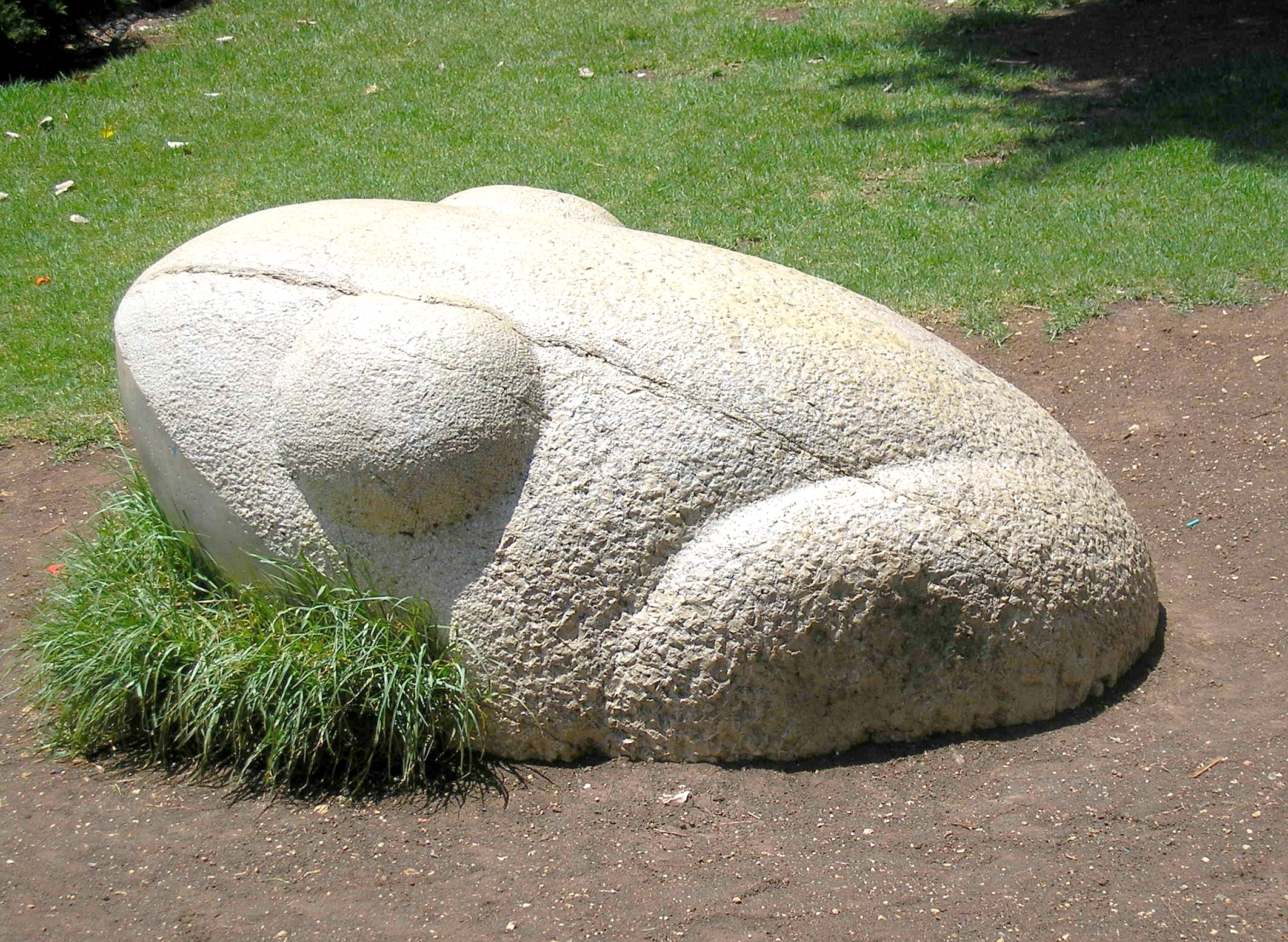 Gan Eliezer, Rehavia, Jerusalem